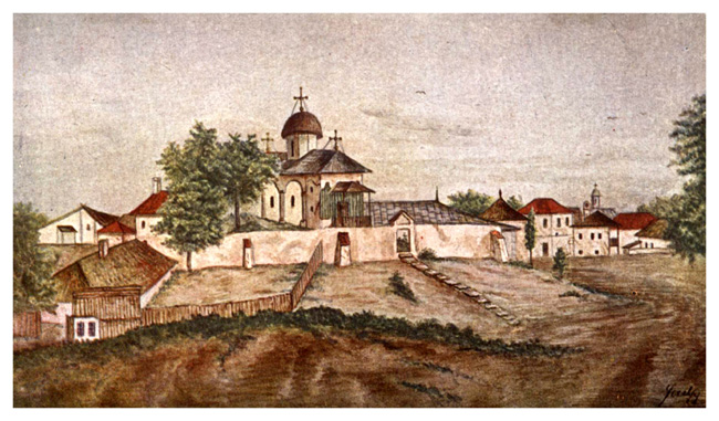 Biserica lui Bucur, Bucharest